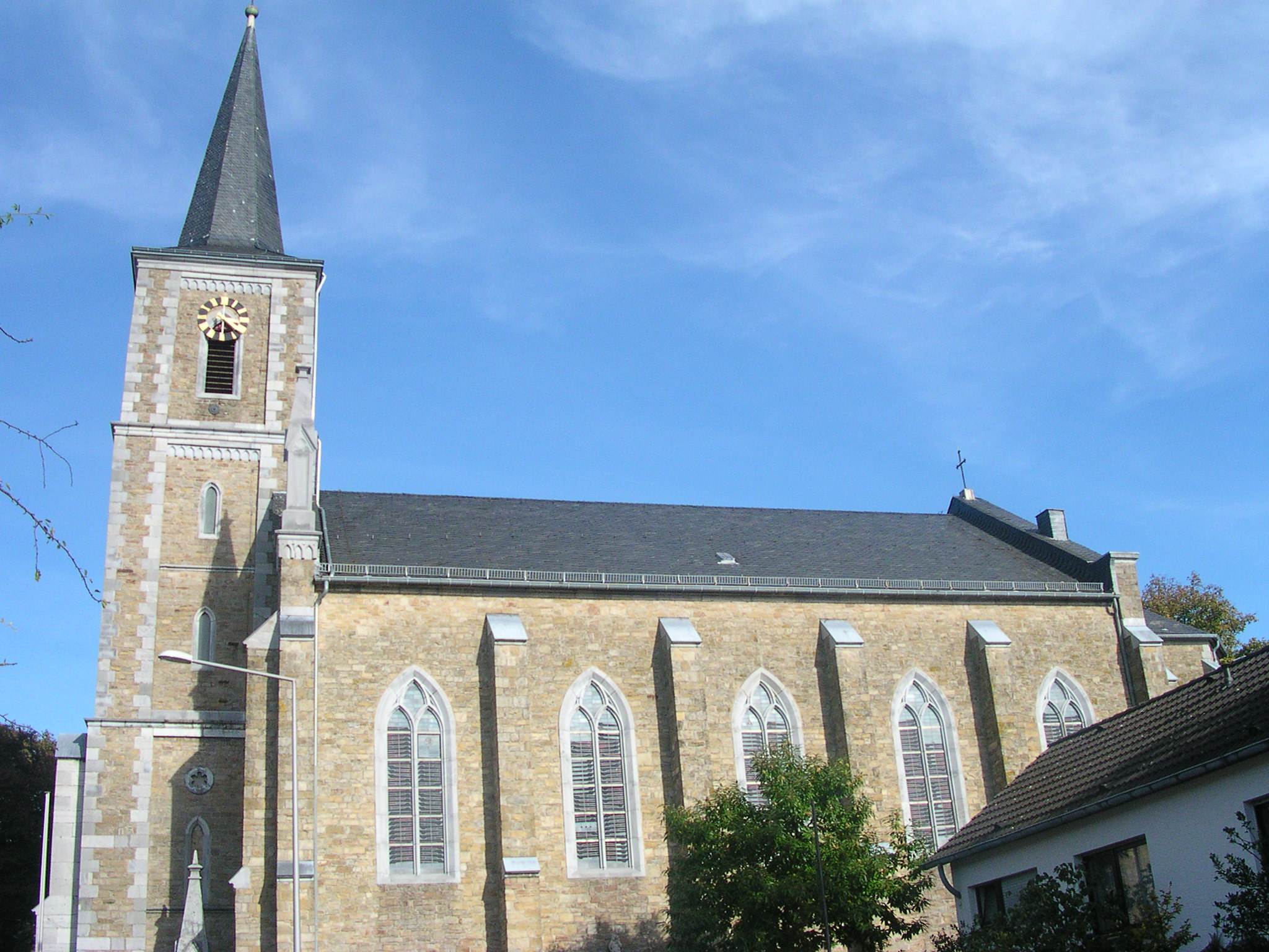 Aachen Walheim, rk. Pfarrkirche “St. Anna”